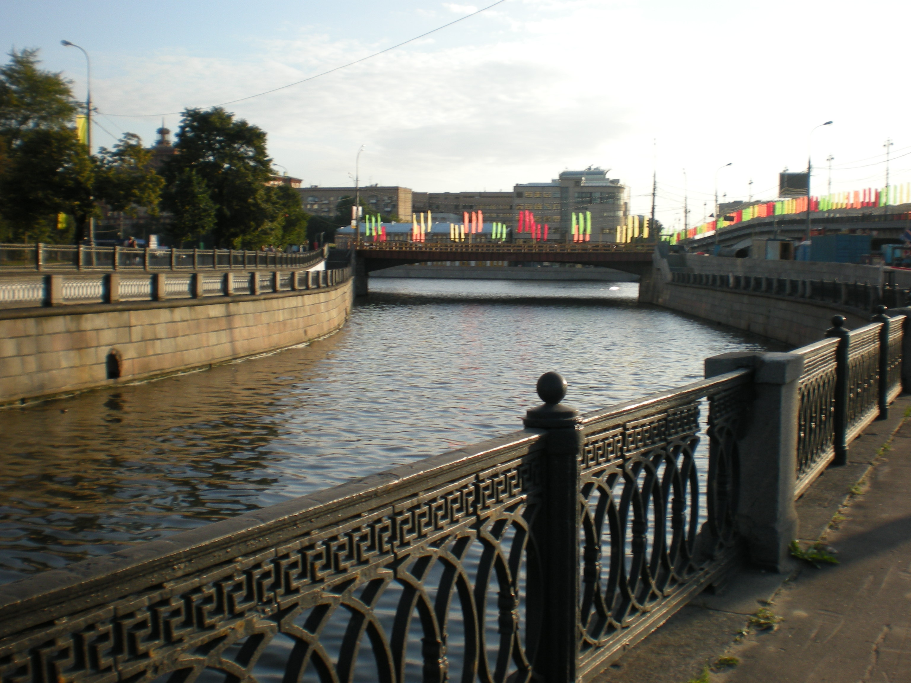 Устье реки Яуза, место впадения в Москву реку в районе Устьинского моста